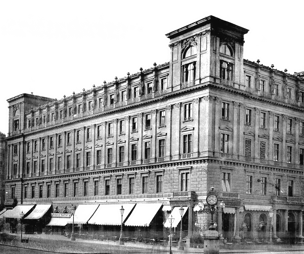 Palais Ephrussi, Wien.